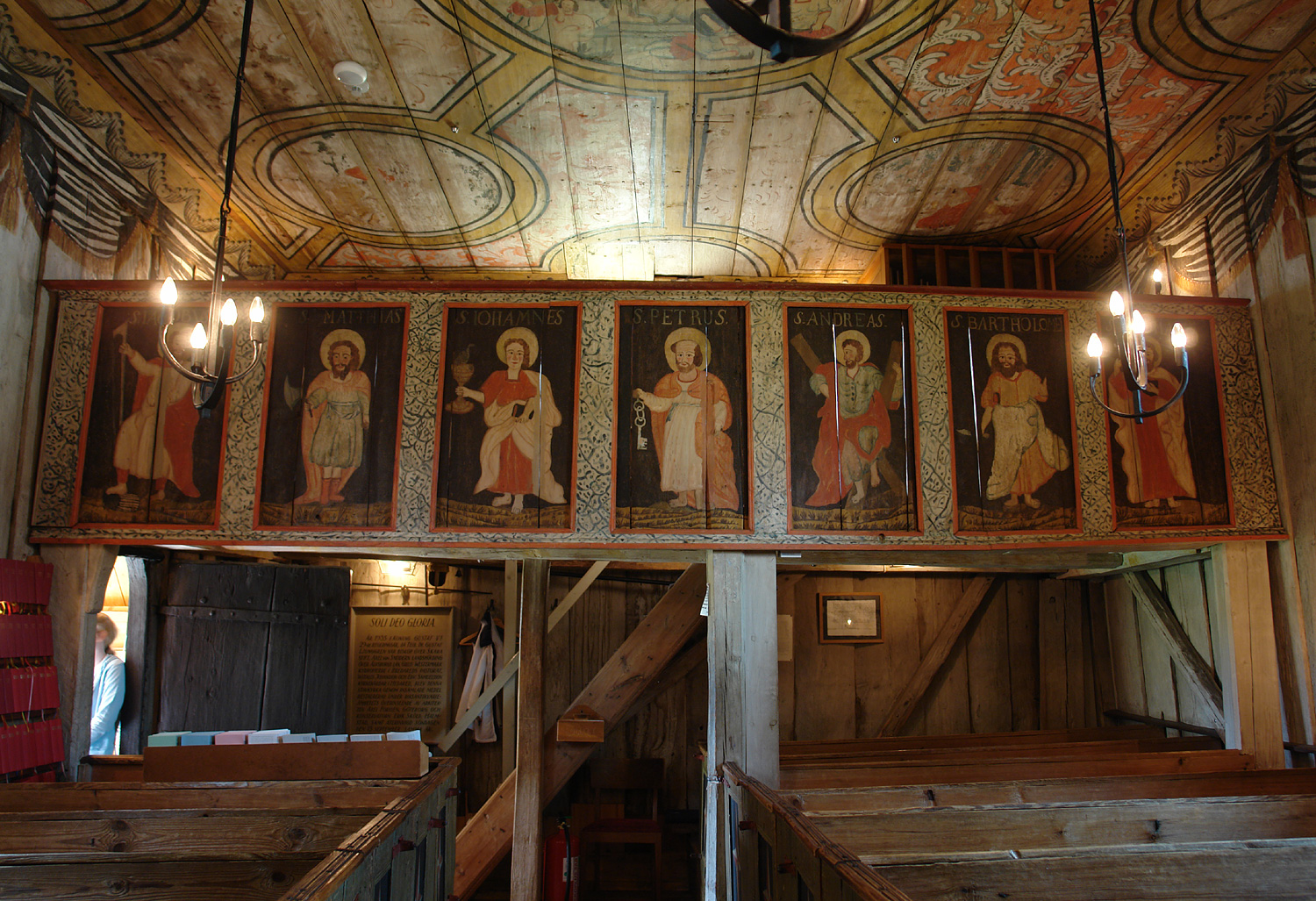 Stabkirche von Hedared: Apostelbilder auf der Brüstung der Empore